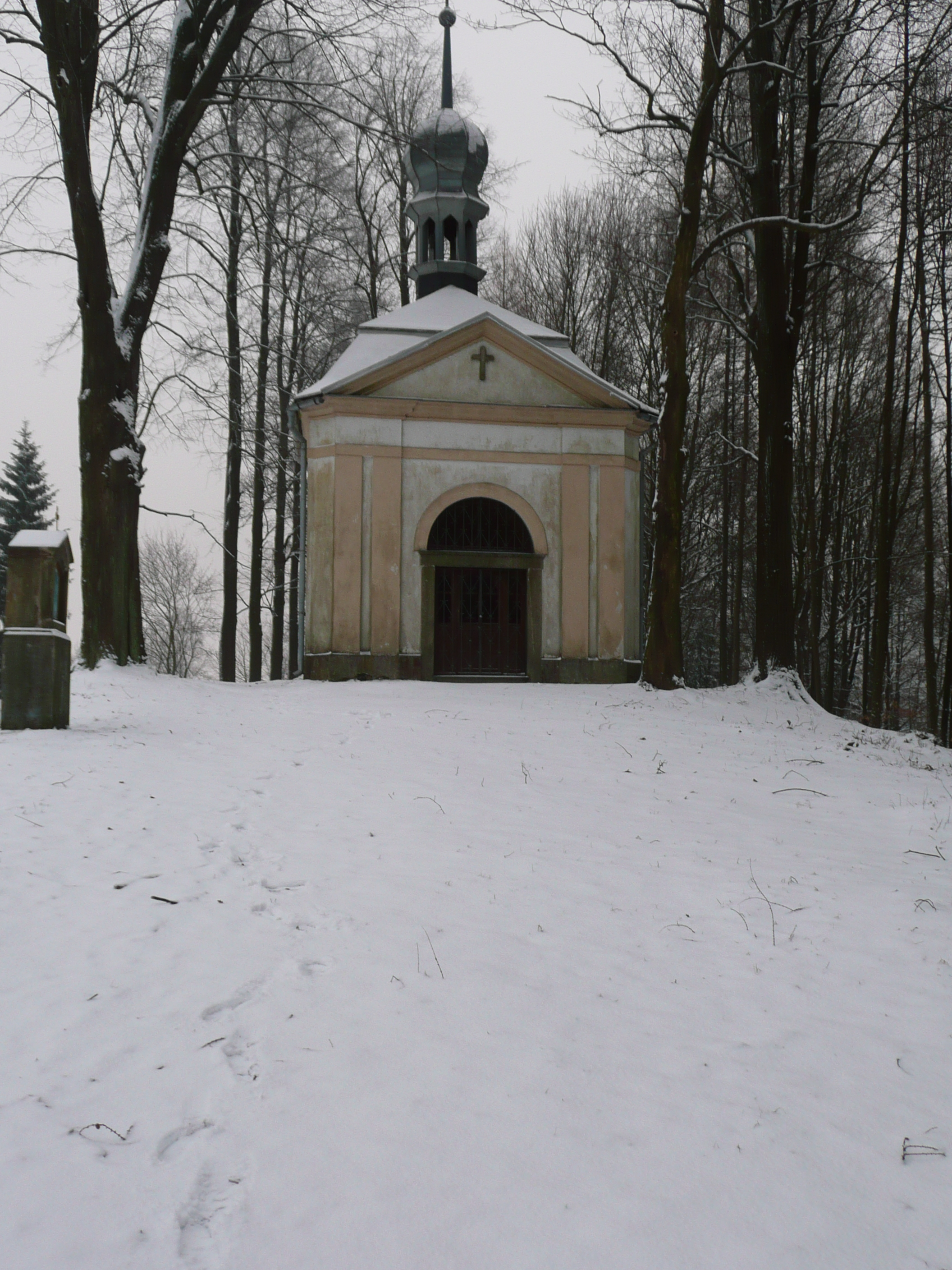 Kapelle auf dem Kapellenberg von Brtníky